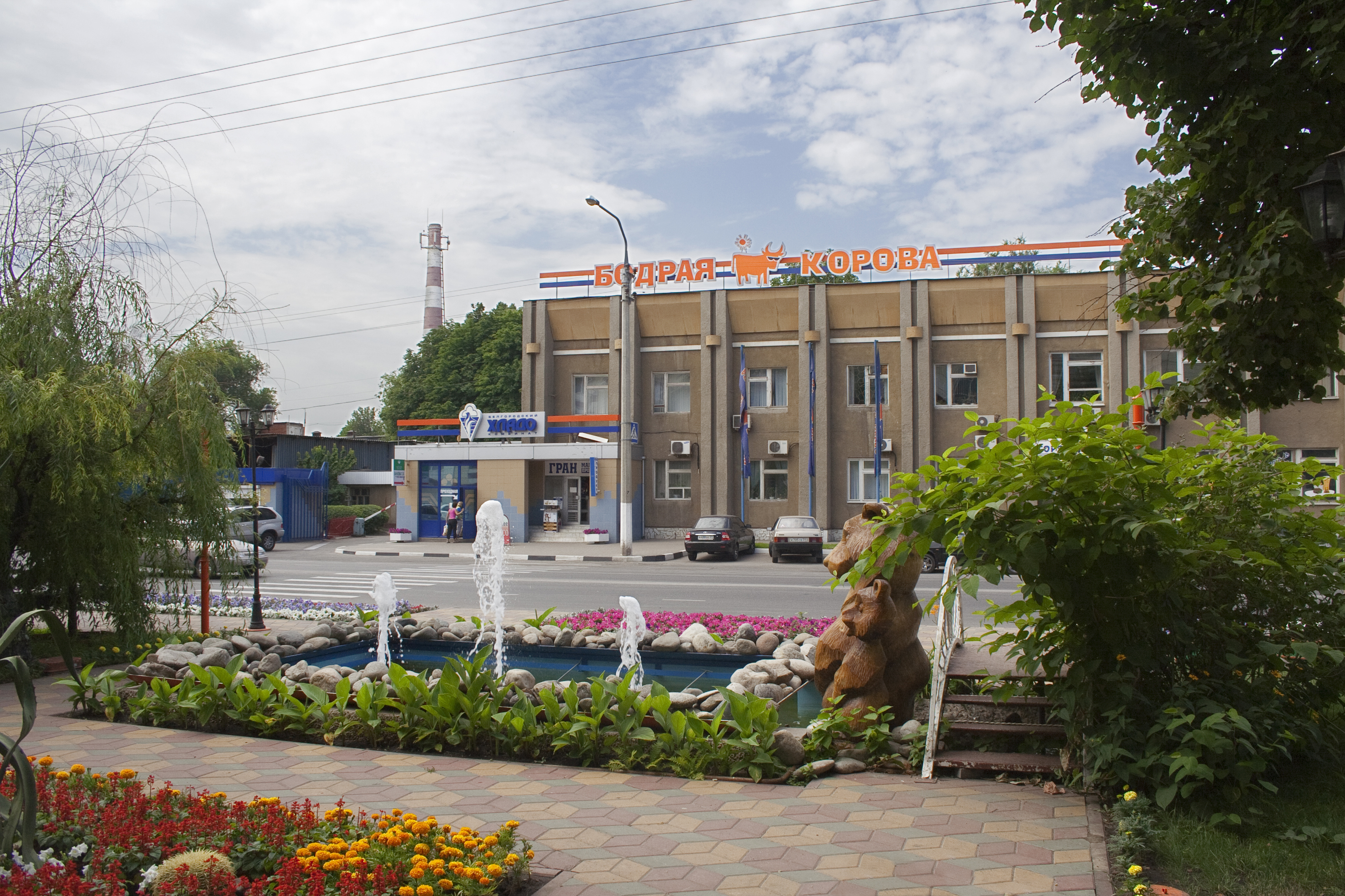 Белгородский хладокомбинат. Город Белгород.